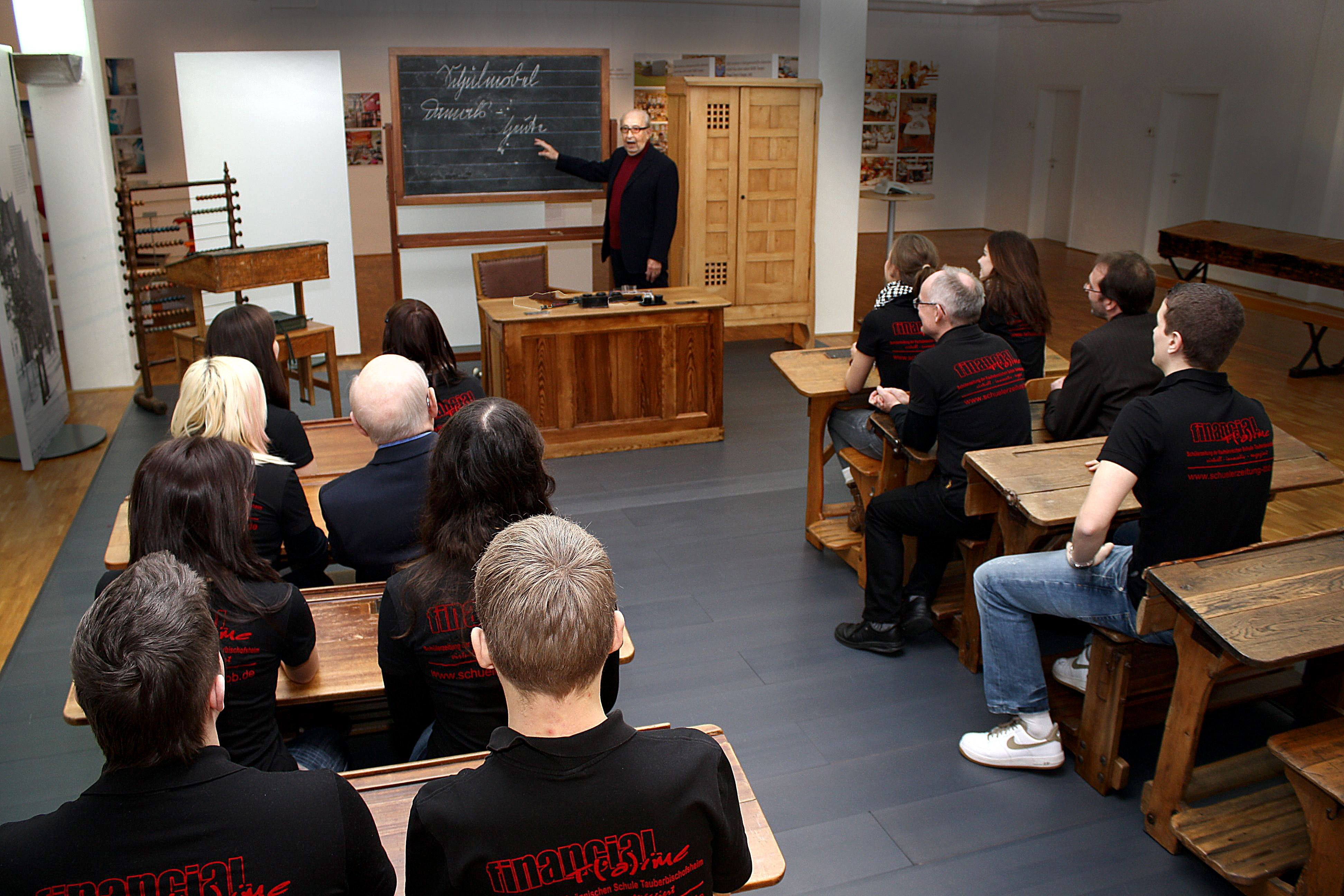 Die Financial T(’a)ime, Schülerzeitung der Kaufmännischen Schule Tauberbischofsheim, trifft Bruno Rottenbach, einen fast hundertjährigen Artikelschreiber, im VS Museum in Tauberbischofsheim.